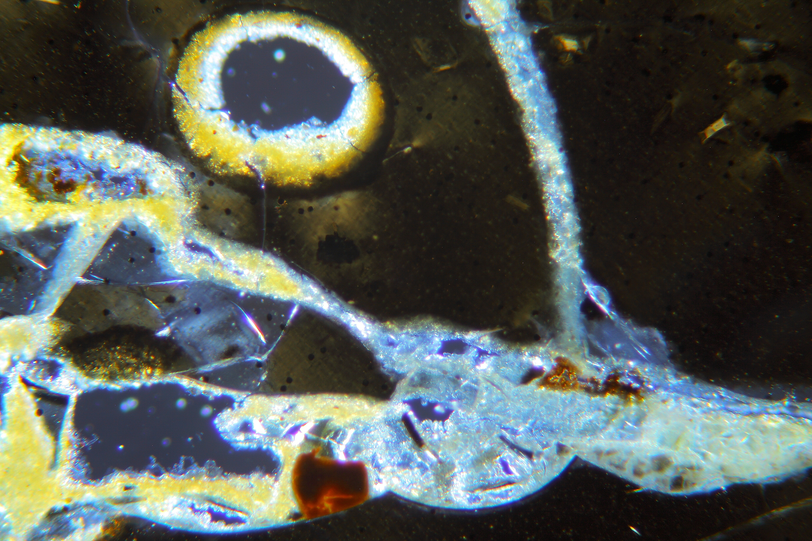 Palagonit (Dünnschliff, XPL)